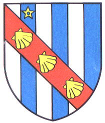 Wappen von Grandcour Kanton Waadt Schweiz